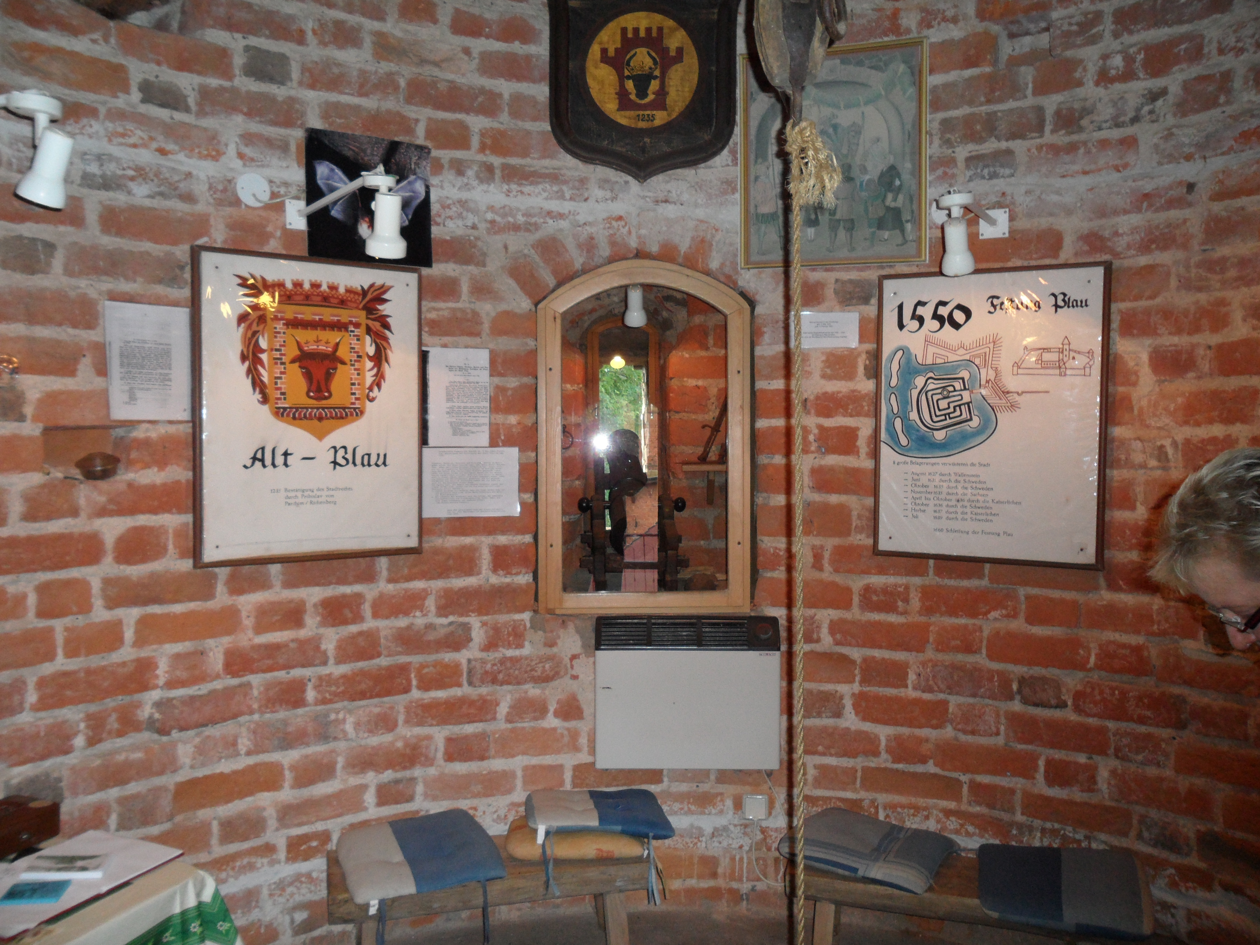 Innenansicht Burgturm Plau am See